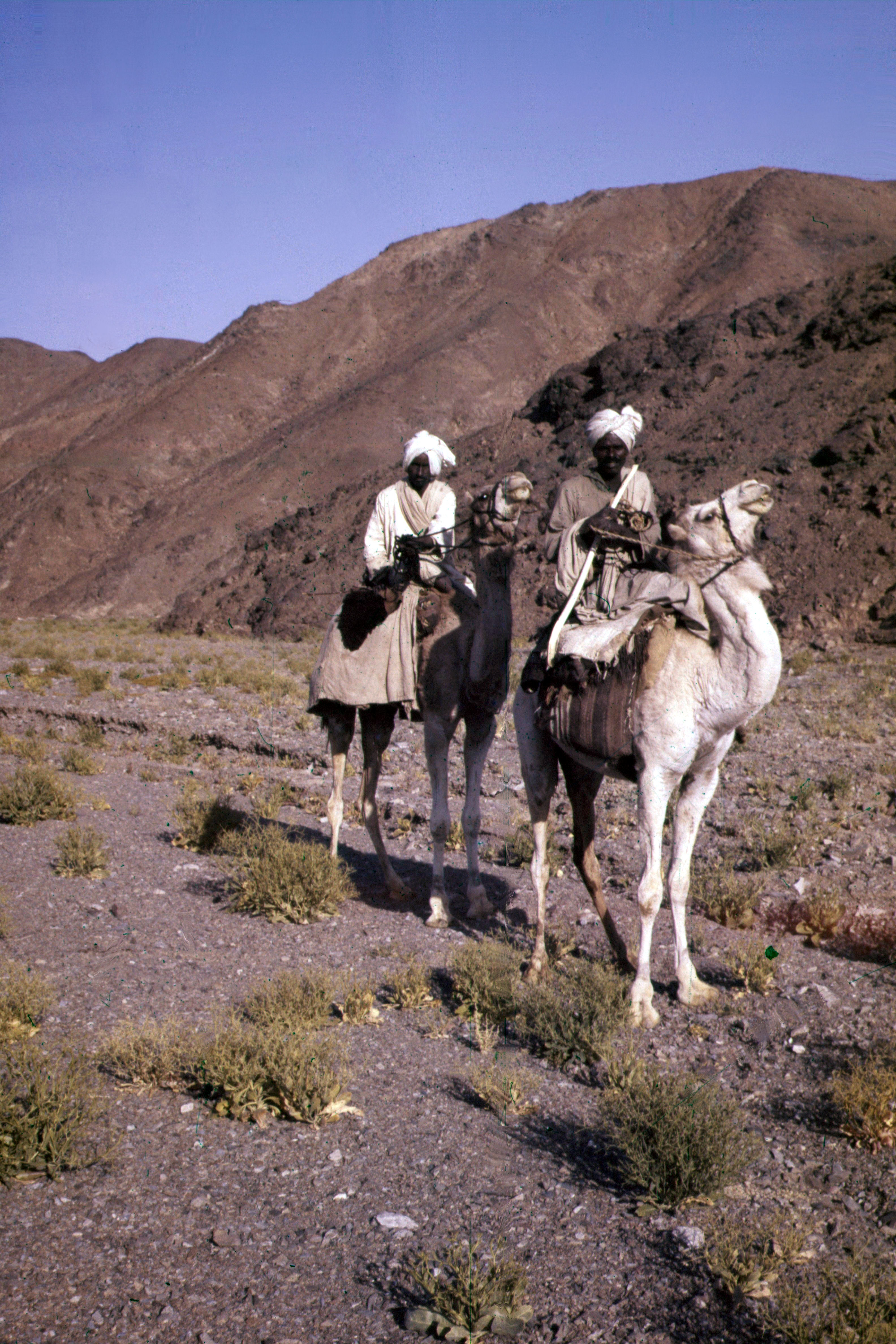 Ababdas im Wadi Ghamis (1961)